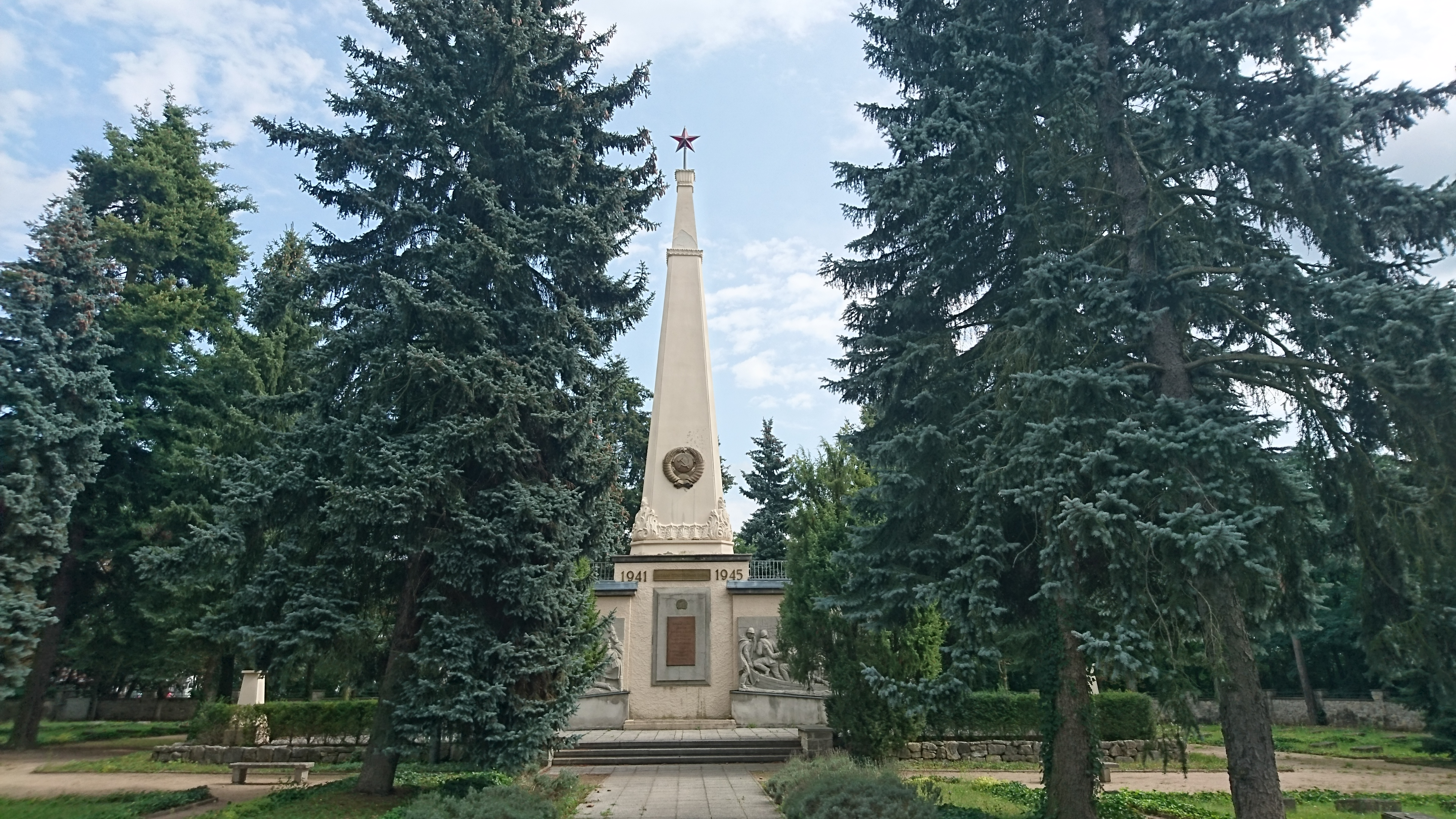 Obelisk auf dem sowjetischen Ehrenfriedhof in Baruth/Mark